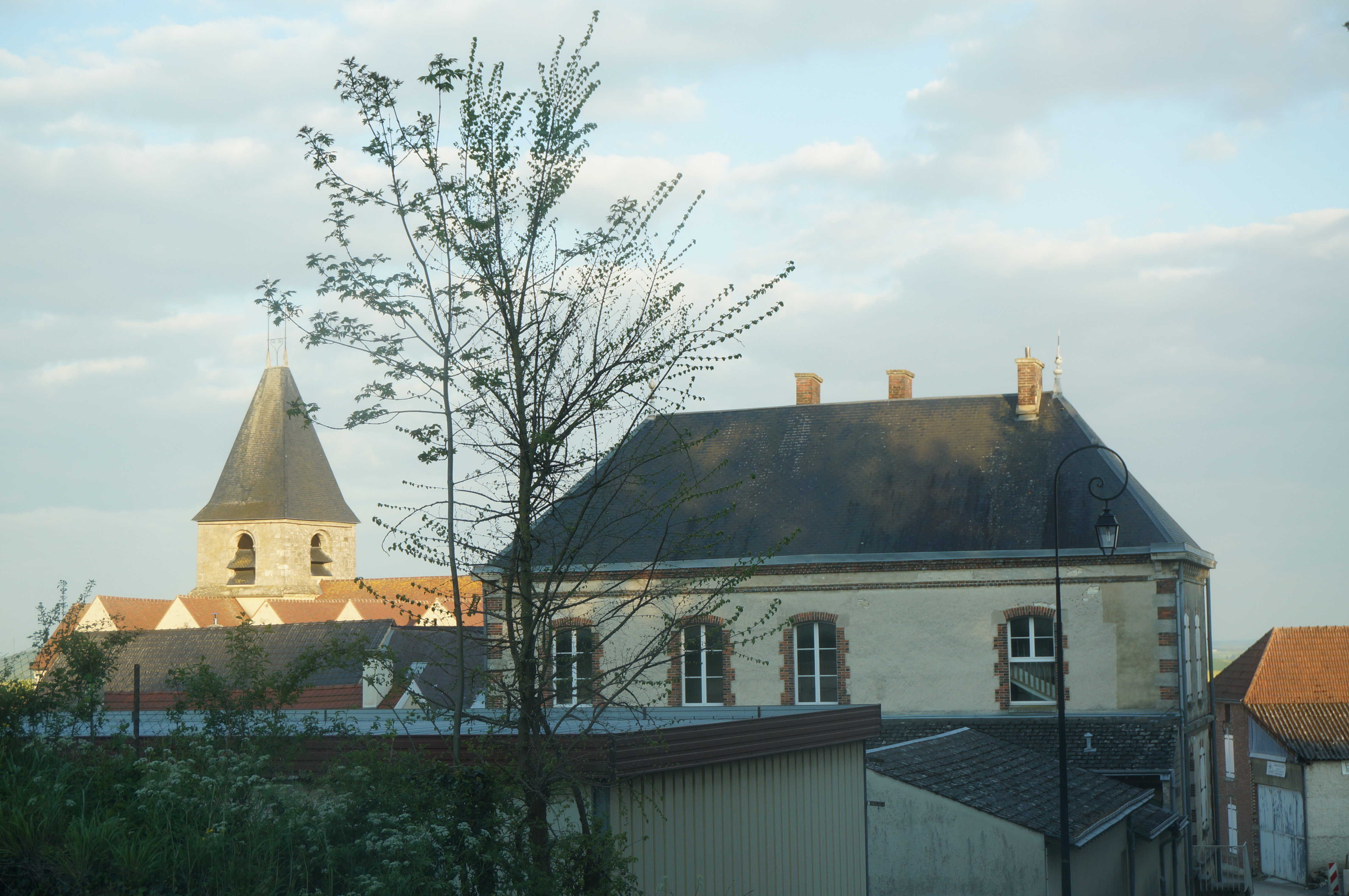 visible la mairie et l Église de Loisy-en-Brie.